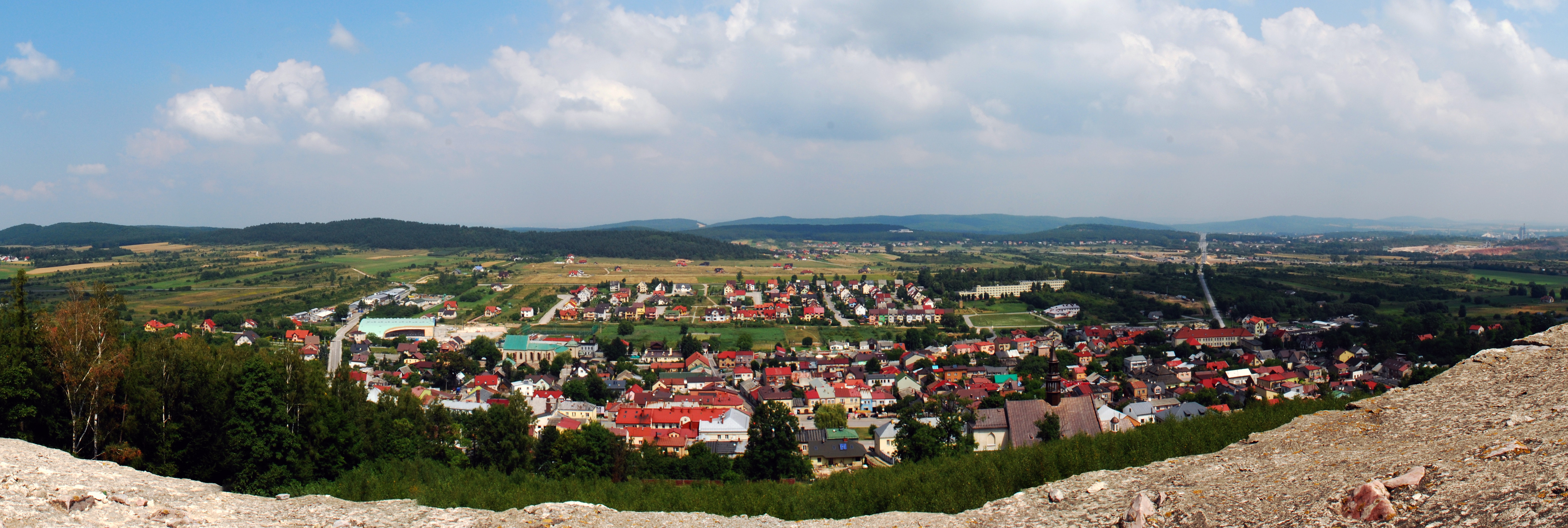 Panorama Chęcin z muru zamku